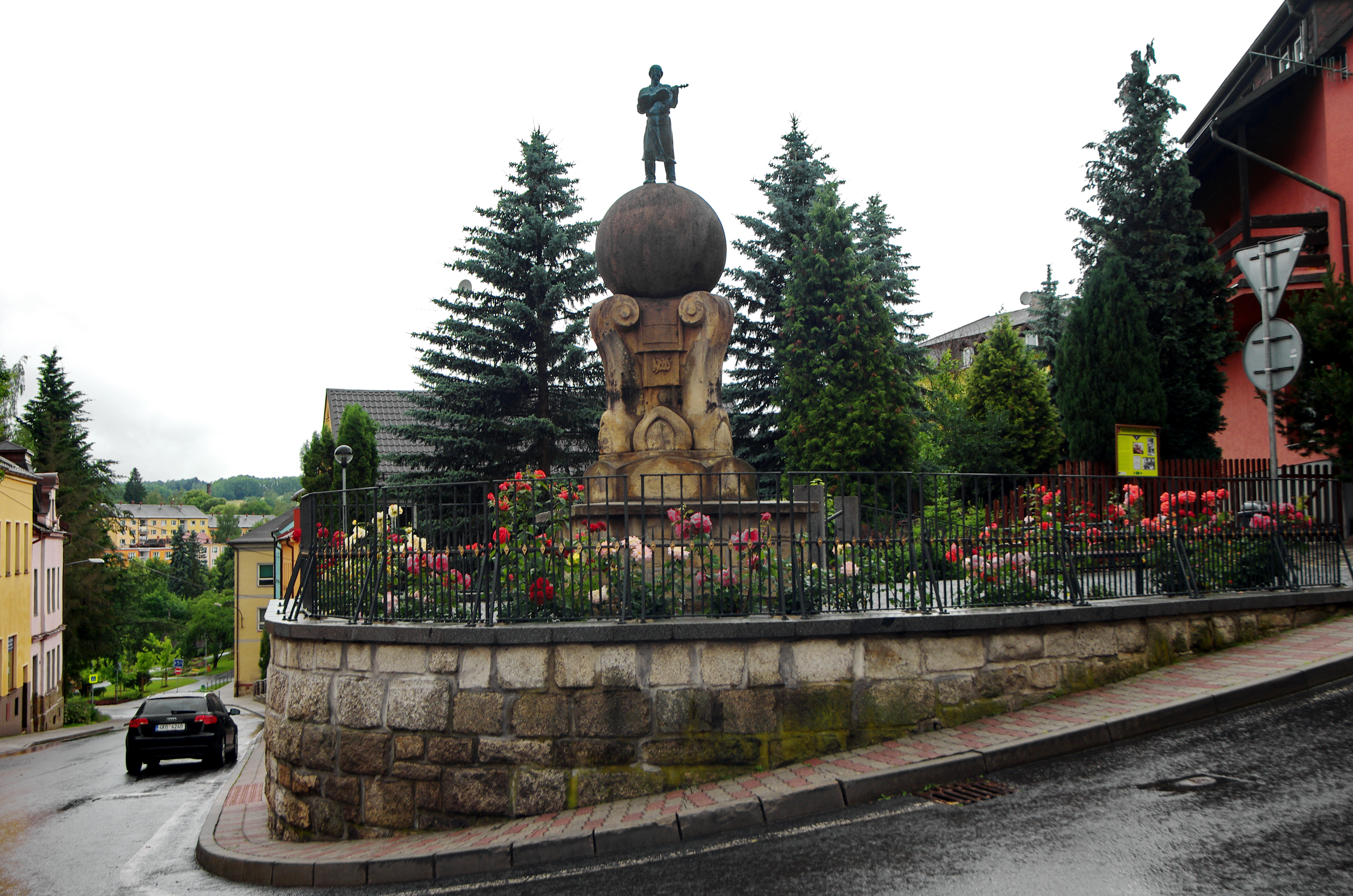 Socha houslaře v Lubech, okres Cheb